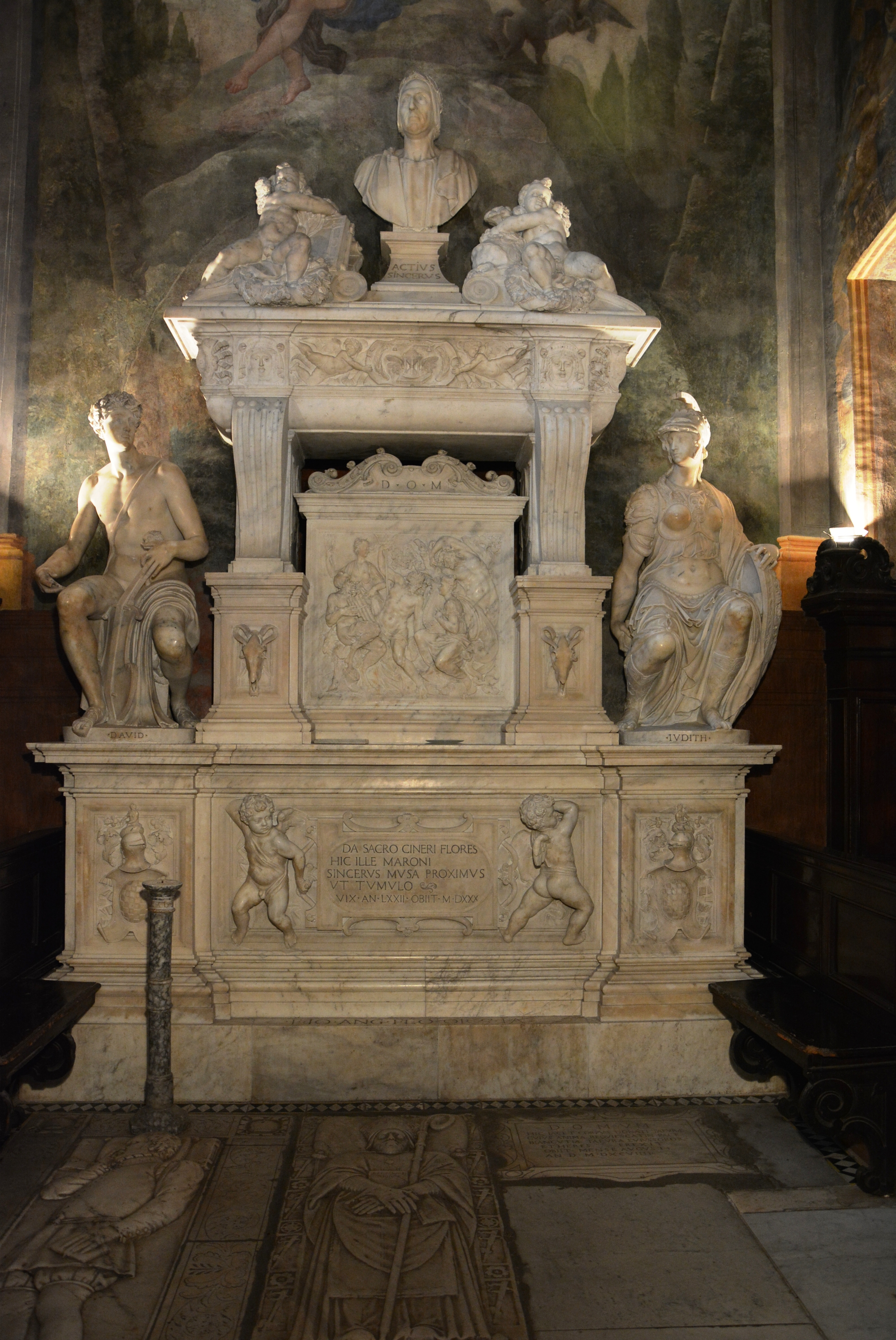 Chiesa di Santa Maria del Parto a Mergellina, a Napoli